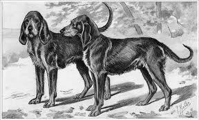 Chien gris de St. Louis. (gravure)